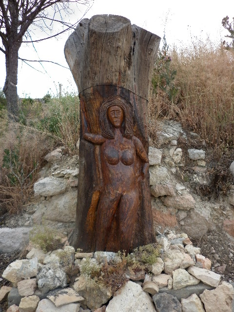 Imagen de la talla en tronco de un olmo viejo en Homenaje a la Mujer Soriana realizada artesanalmente por un vecino de la localidad, don Luis Martínez del Cura.